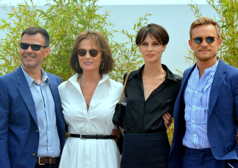 François Ozon, Jacqueline Bisset, Marine Vacth et Jérémie Renier lors de la présentation du film "L'Amant double" au festival de Cannes.